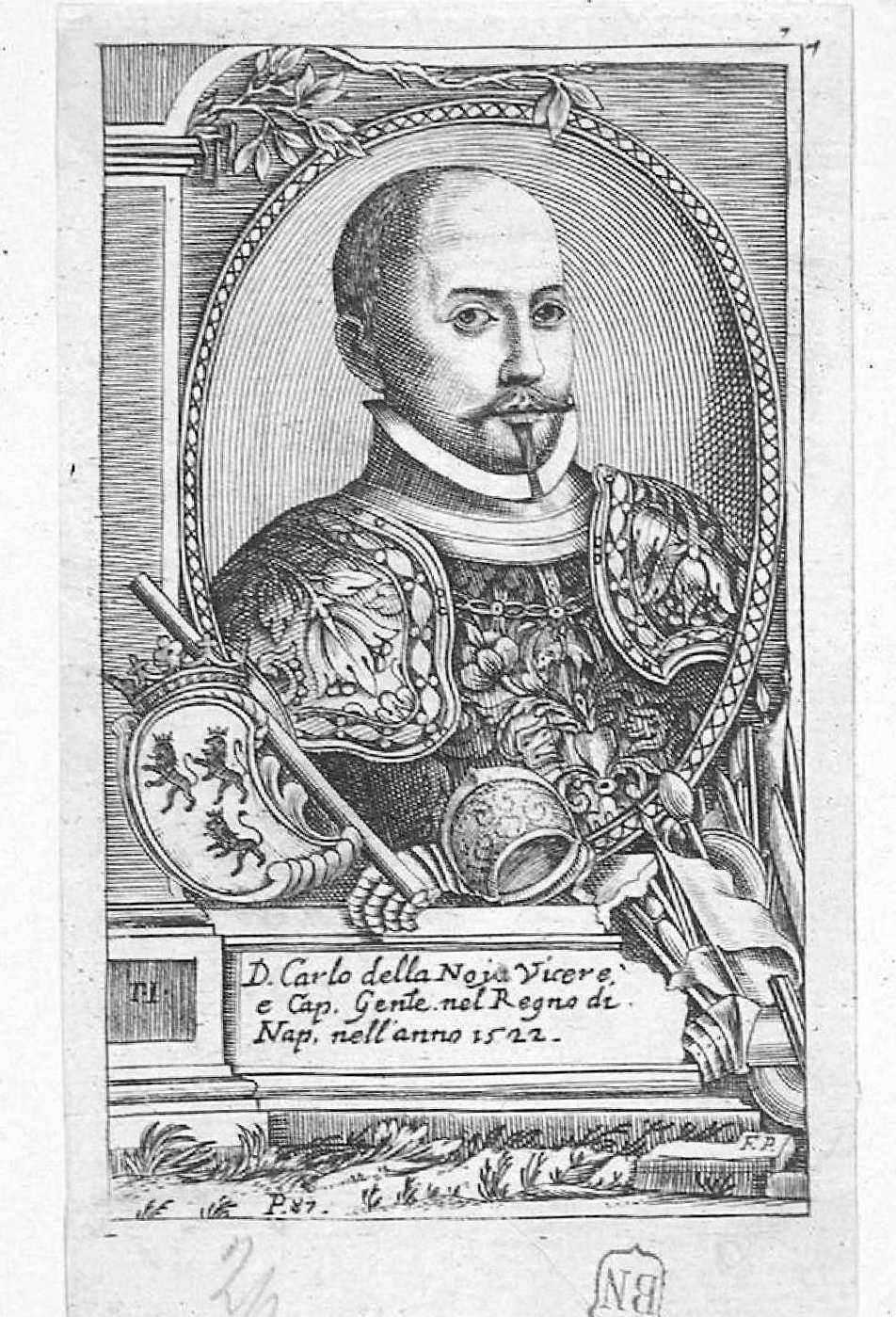 Carlos Lannoy. Grabado calcográfico anónimo recogido en Teatro eroico, e politico de'governi de'Vicere del Regno de Napoli, de Domenico Antonio Parrino, Nápoles, 1692-1695. Biblioteca Nacional de España